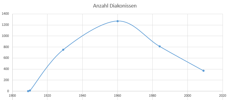 Anzahl der Diakonissen der Hensolthöhe Gunzenhausen nach eigenen Angaben